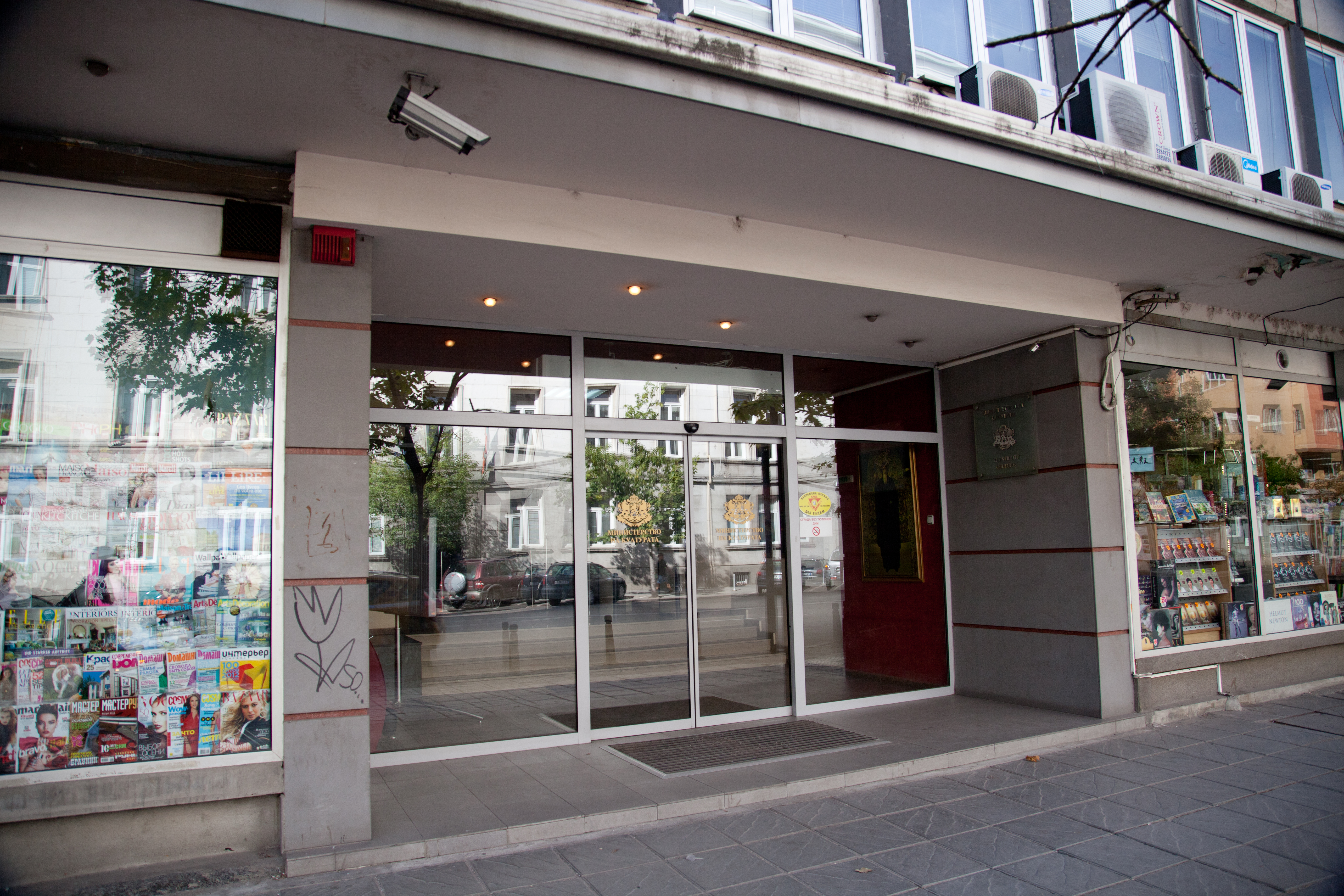 Sofia, Ministerium